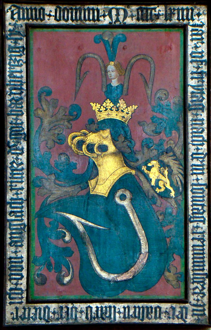 Gradenkmal eines Herrn von Angelach in der Alexanderkirche in Marbach am Neckar